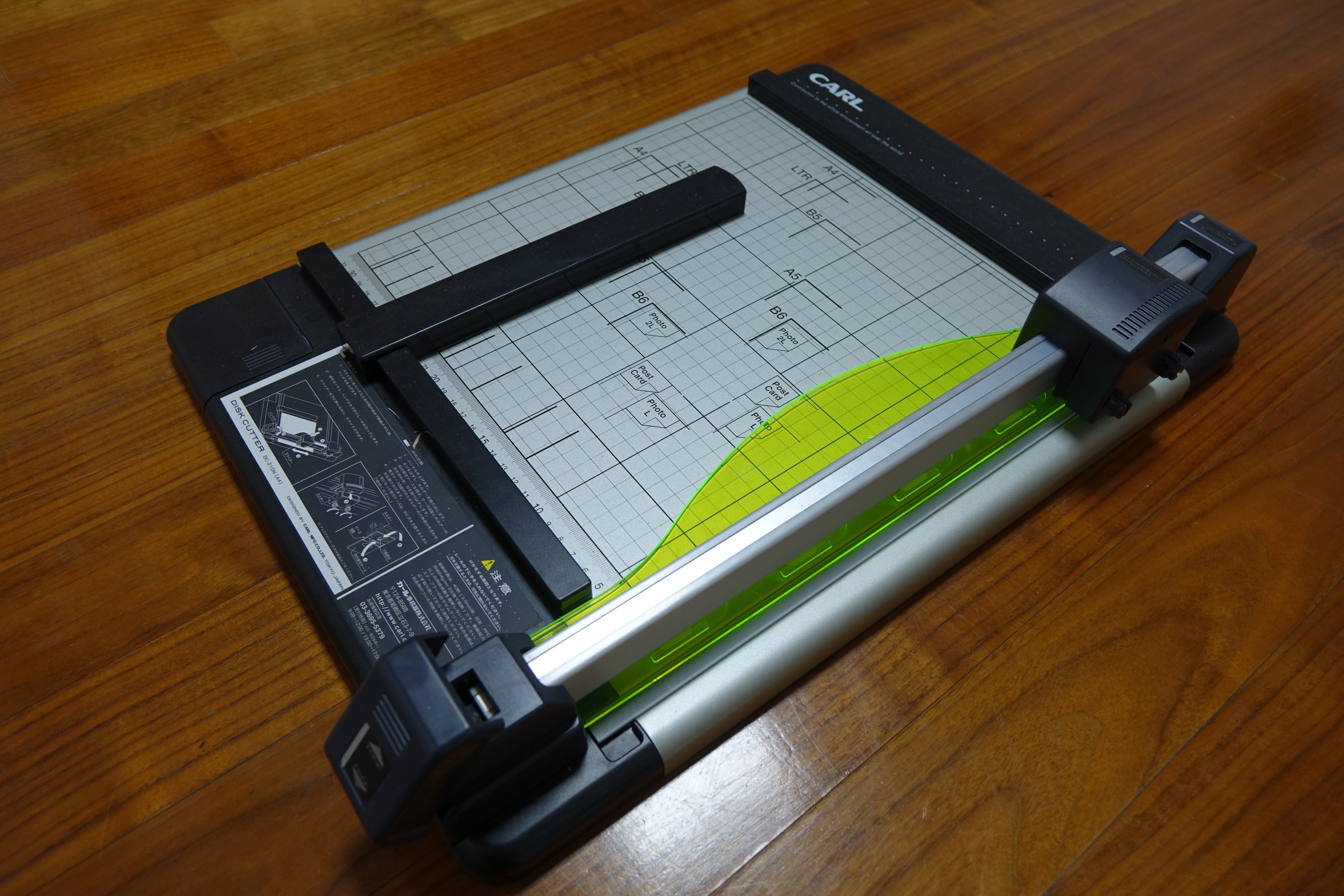 CARL 재단기